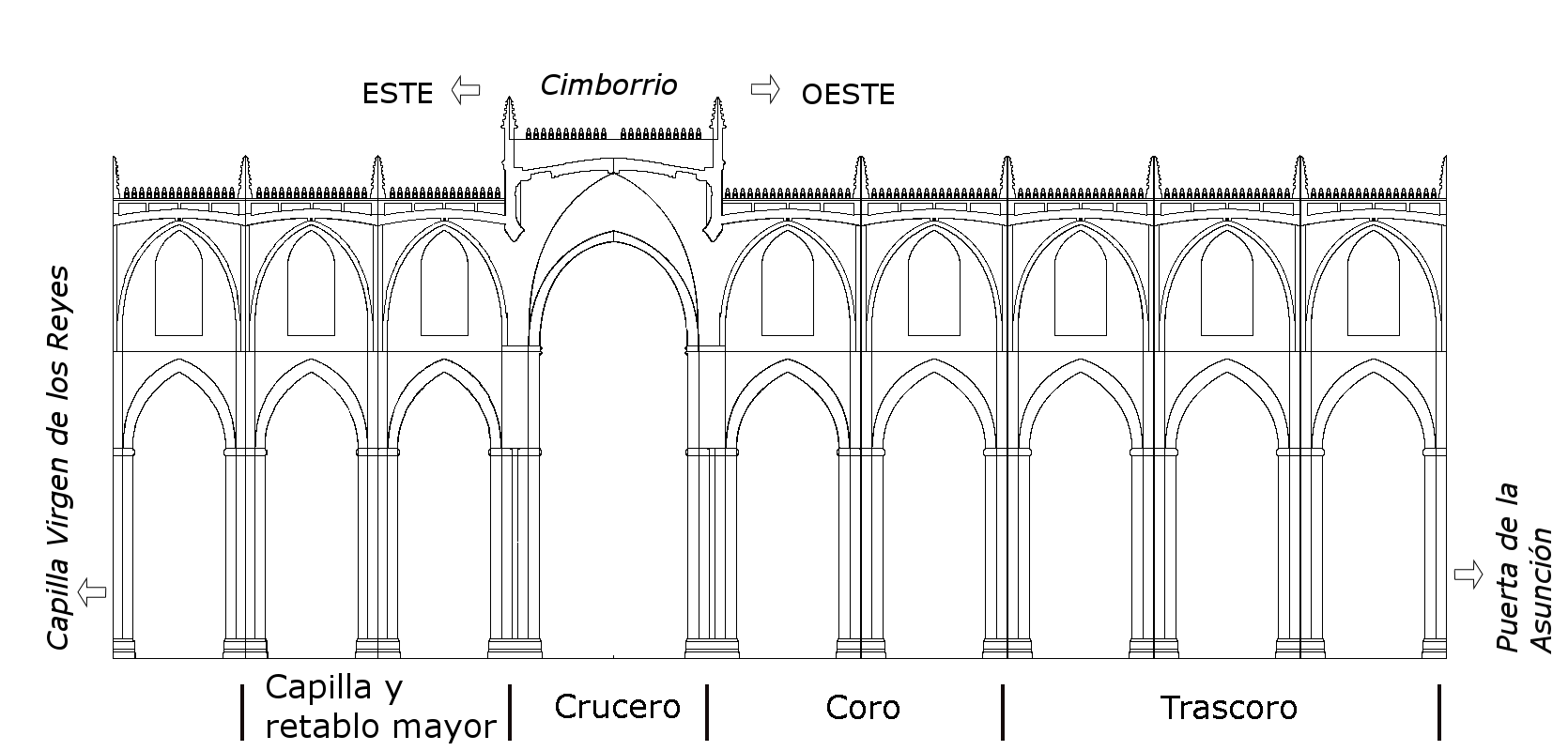 Alzado de la nave central de la Catedral de Sevilla en direccion este-oeste, desde la Capilla de la Virgen de los Reyes hasta la Puerta de la Asunción